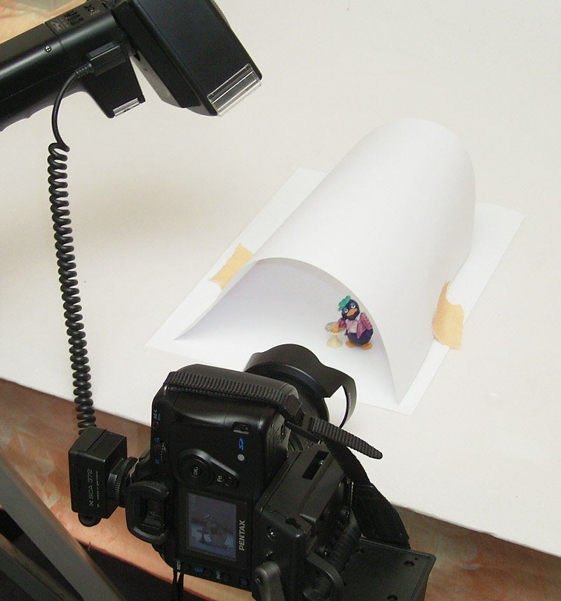 Aus einem Blatt Schreibmaschinenpapier improvisiertes Lichtzelt zur weichen Ausleuchtung bei der Fotografie kleiner Gegenstände.